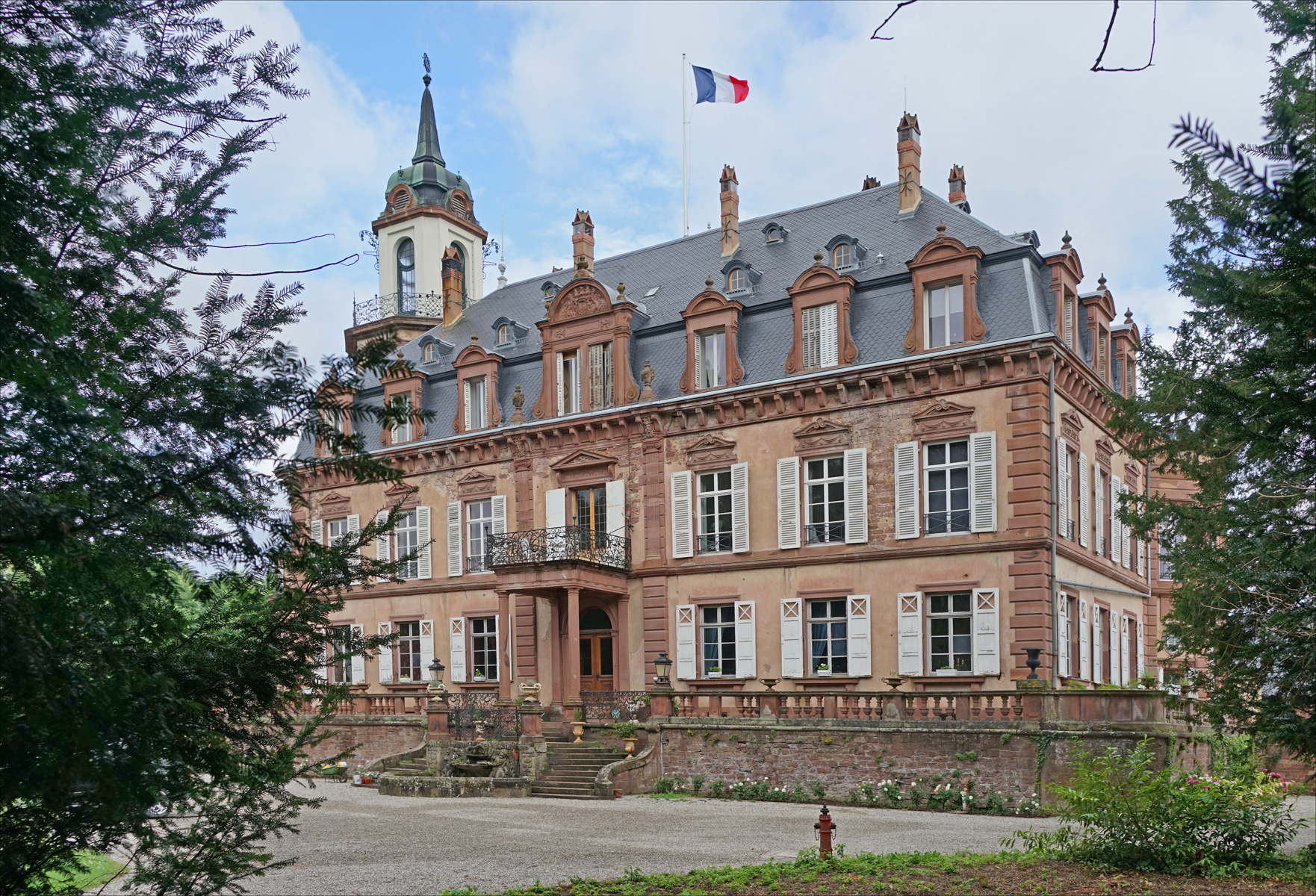 Le château de Froeschwiller (classé monument historique en 2009) La famille Eckbrecht de Durckheim tenait en fief de l'évêque de Strasbourg le village de Froeschwiller depuis le 14e siècle. Le château, accolé à l'église du village, était constitué d'un corps principal flanqué de deux tours et de dépendances accessibles par une porte dans un corps de passage. A l'arrière se trouvaient jardin et parc. Vers 1850, le château fut reconstruit et se présentait comme une grande villa rectangulaire, avec un balcon porté par des piliers. Il fut à nouveau transformé et agrandi en 1890 par l'architecte Gabriel von Seidl qui y ajouta un toit brisé, avec lucarnes à frontons et une tour couverte d'un belvédère. Un second bâtiment d'habitation fut élevé à ses côtés, réuni au bâtiment principal par un passage à l'étage porté par un arc surbaissé. Les dépendances portent la date de 1891. Extrait de la base Mérimée du ministère de la culture Le château est situé à coté de "l'église de la Paix" (Friedenskirche) qui a été reconstruite après la guerre de 1870-1871 par l'Allemagne car l'église du village avait été bombardée le 6 août 1870 par l'armée allemande alors qu'elle servait d'infirmerie et d'abri. Les blessés ont été transportés dans le château voisin.